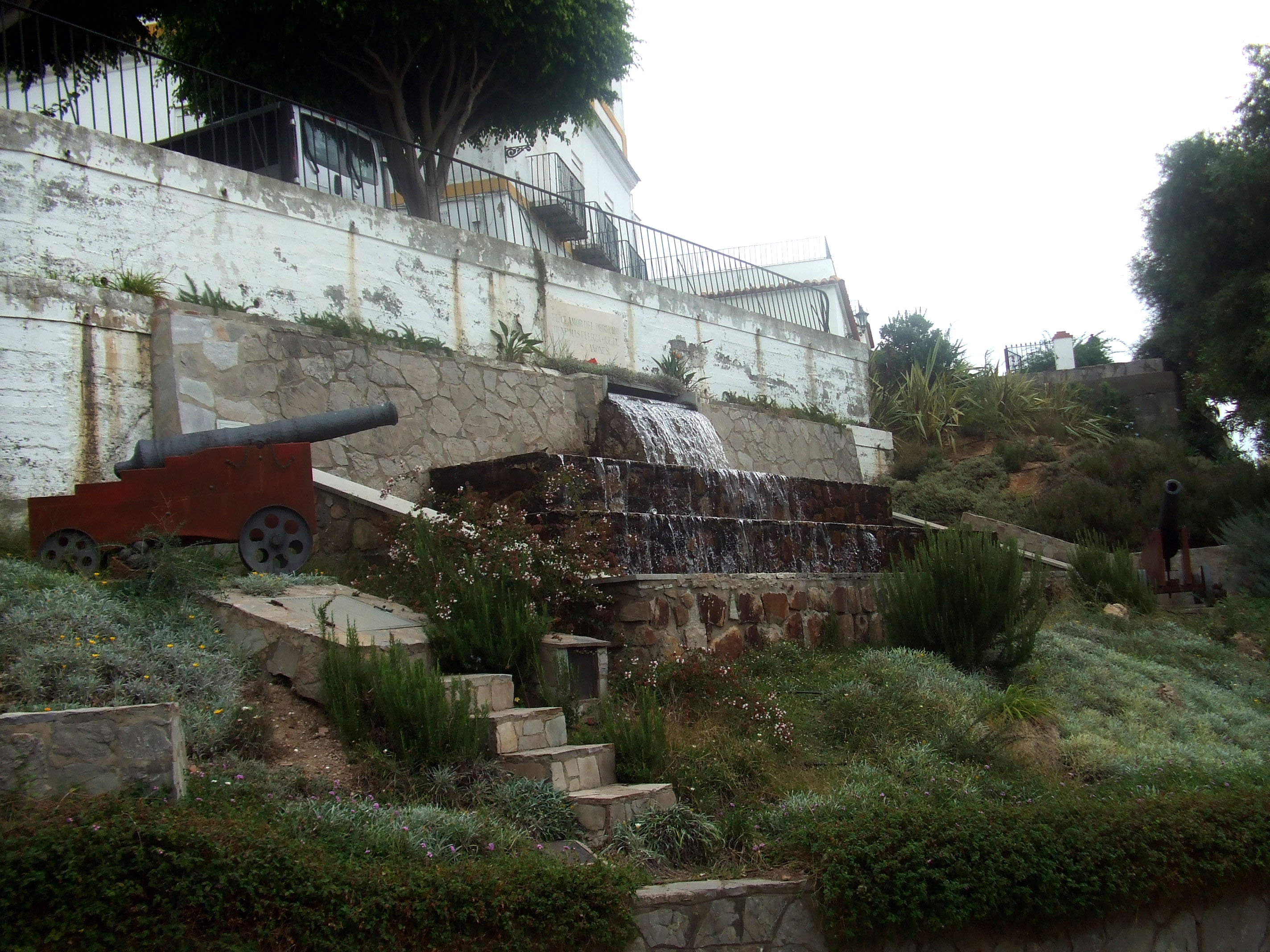 Cañones del Ejército Español del siglo XVIII en San Roque (Cádiz).